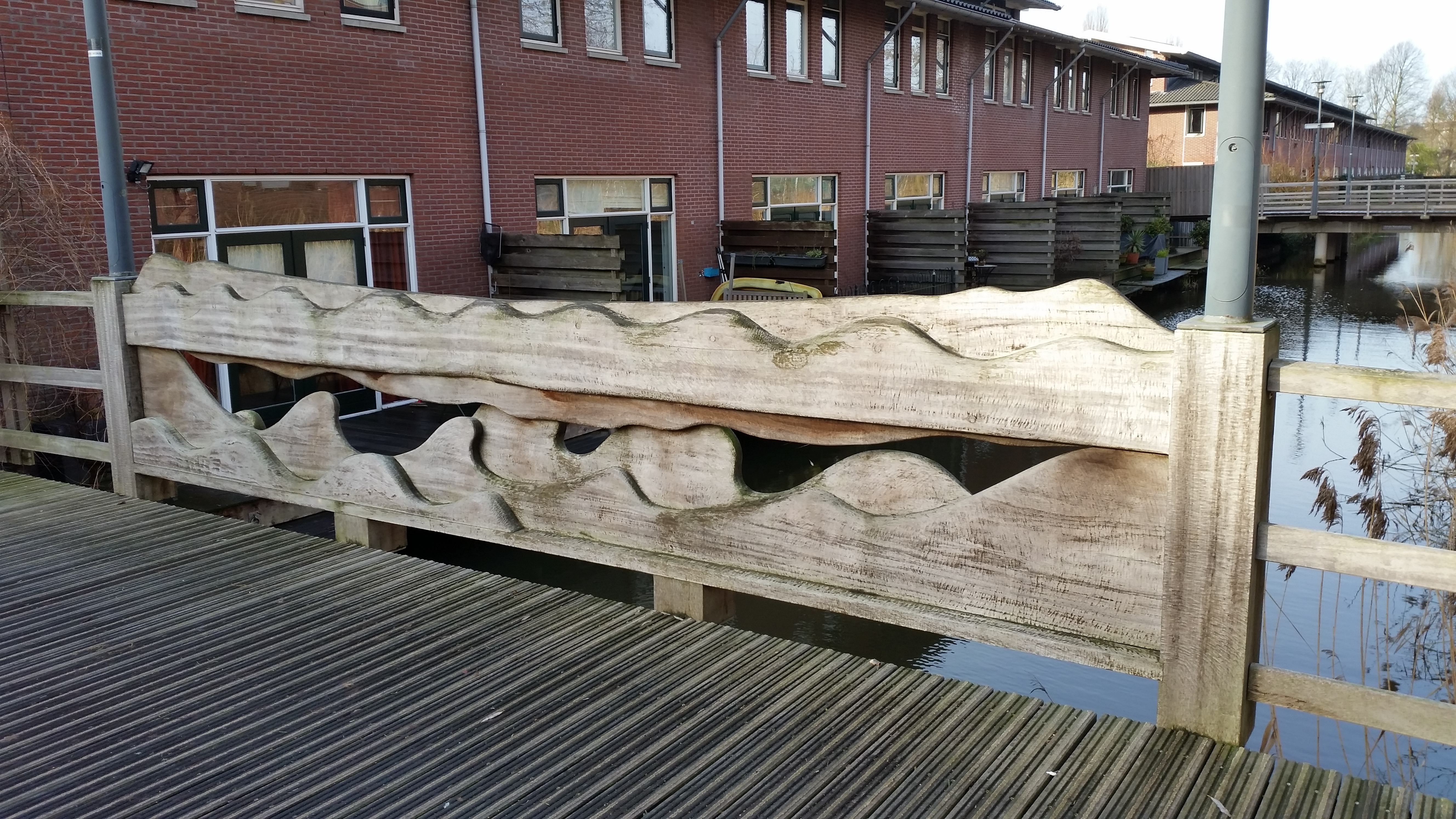 Impressie van de Johan Cruyffbrug in Amsterdam-Watergraafsmeer (januari 2020)